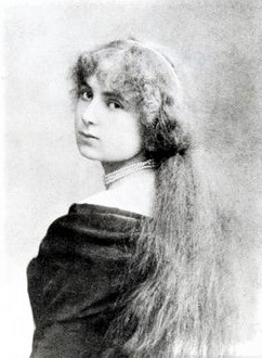 Maria Hardouin